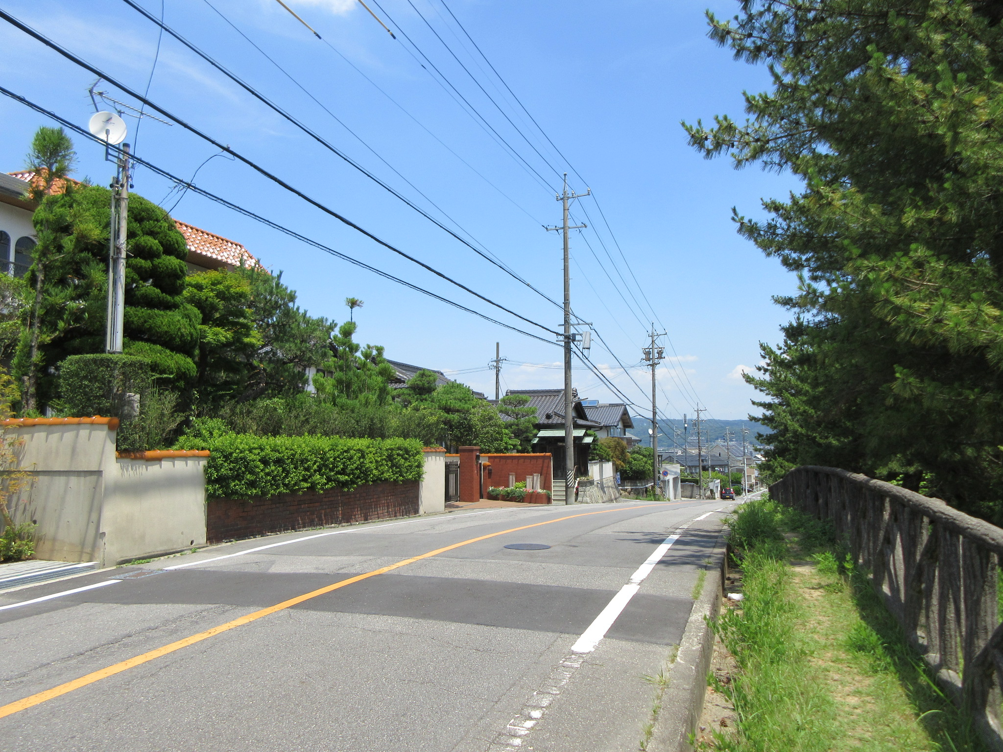 岡崎市竜美旭町（竜美ヶ丘公園の北側）